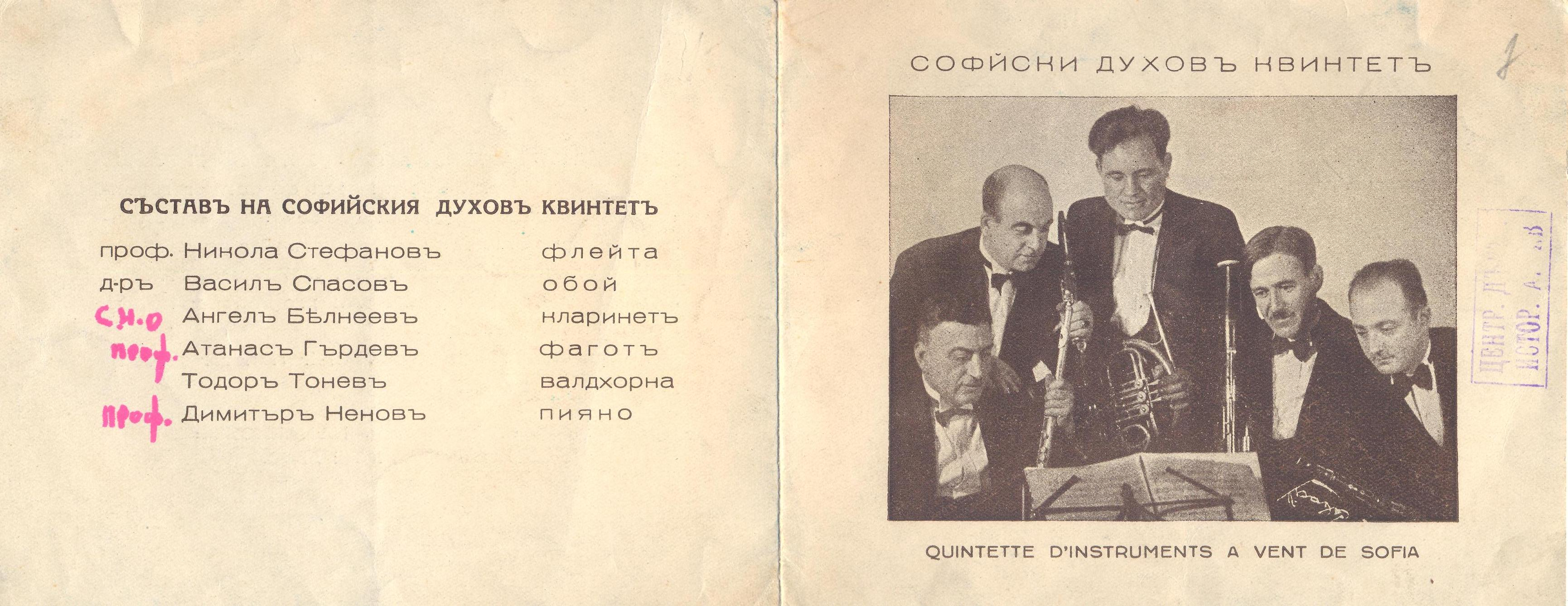 Софийски духов квинтет